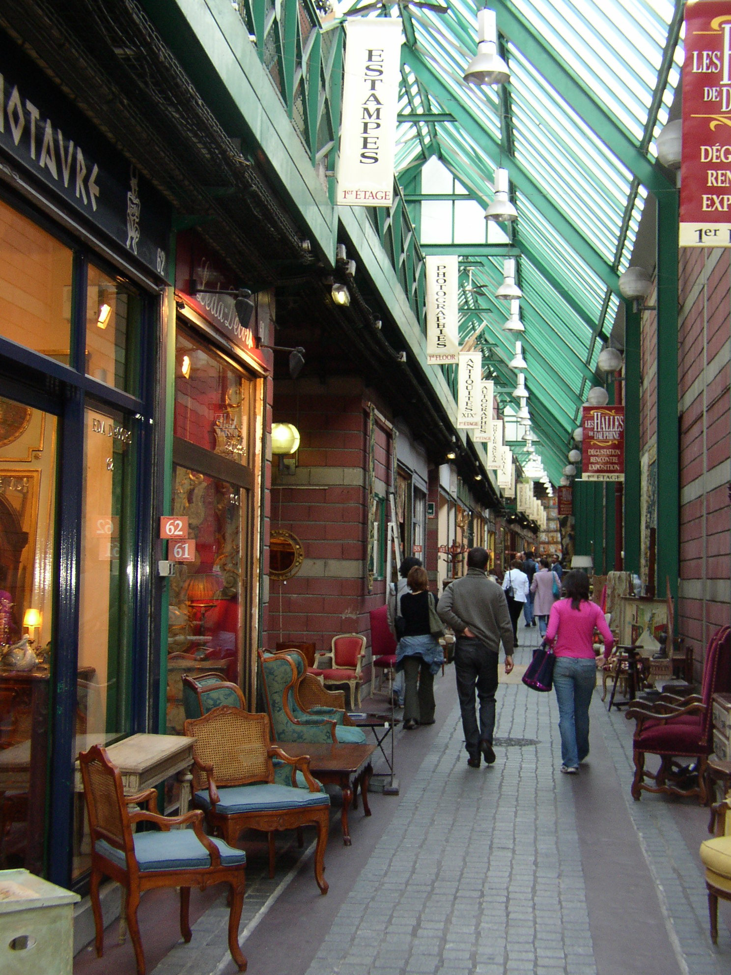 Marché Dauphine, Flea market Porte de Clignancourt, Saint-Ouen, France